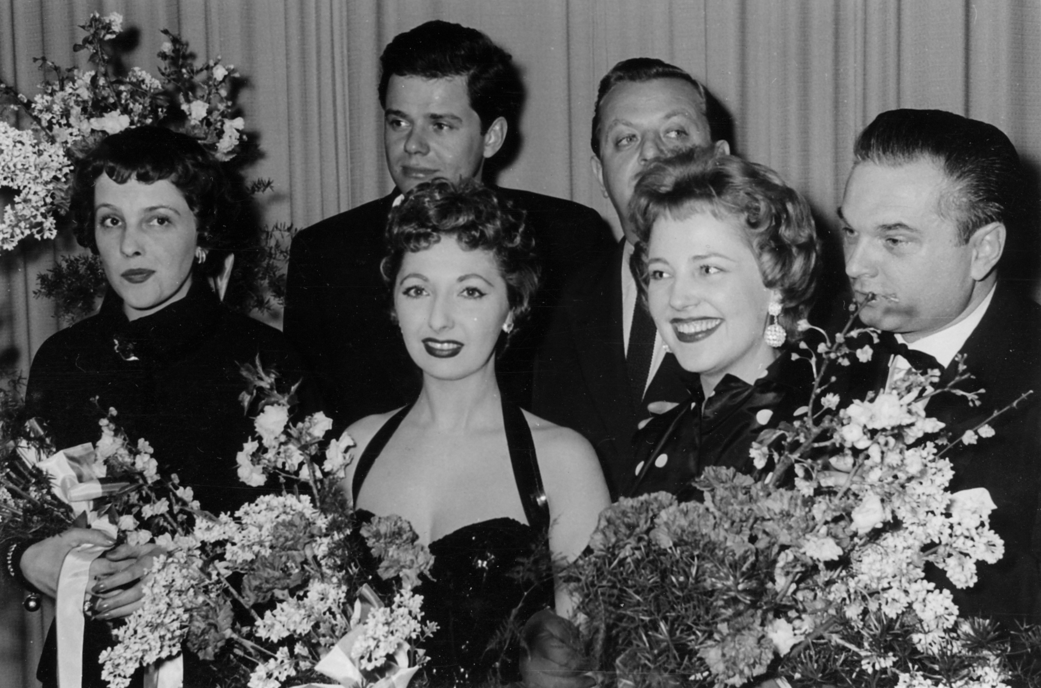 Gruppenfoto von Schauspielern und Beteiligten des Films "Musik, Musik und nur Musik". Von links nach rechts: Inge Egger, Walter Giller, Suzi Miller, Benny de Weille, Lonny Kellner, Ernst Matray. Aufgenommen anlässlich einer Filmvorstellung in Frankfurt am Main im Jahr 1955.